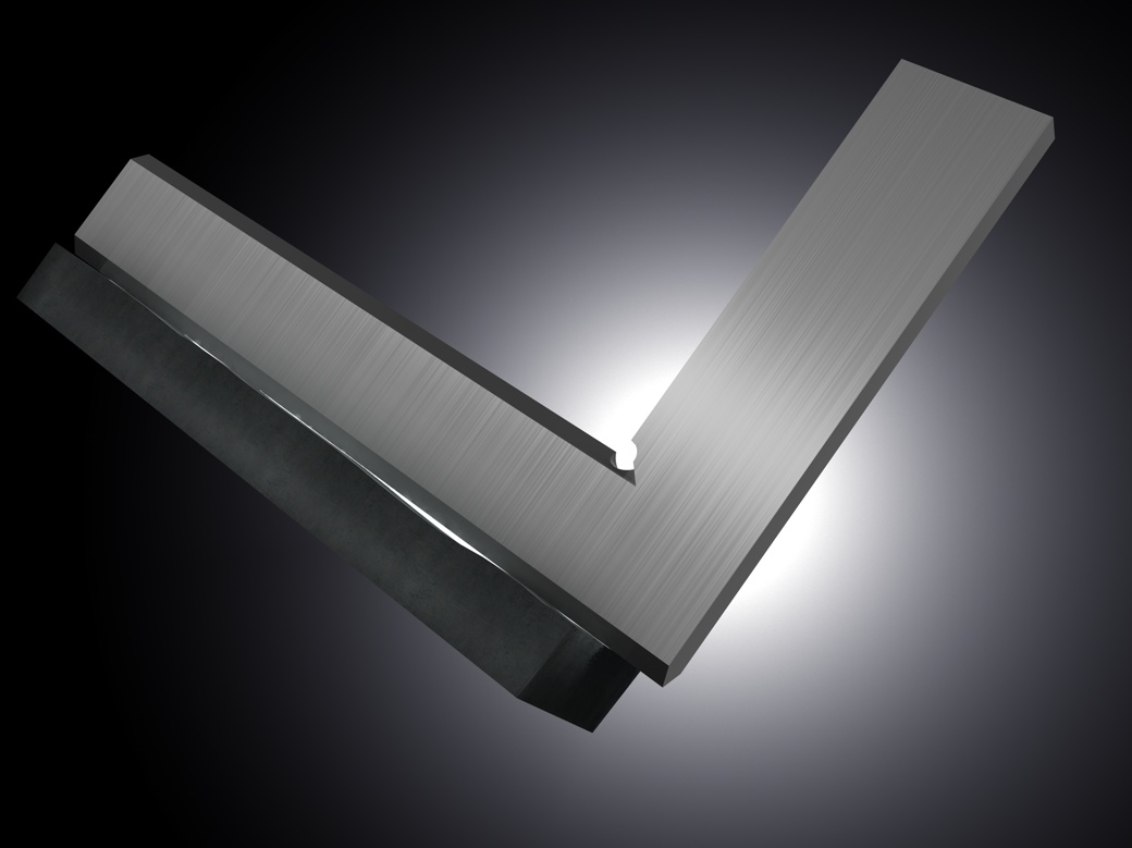 Lichtspaltverfahren / light gap technique